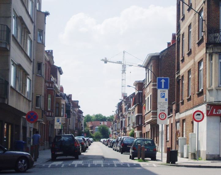 rue des Trois Ponts Auderghem Belgium